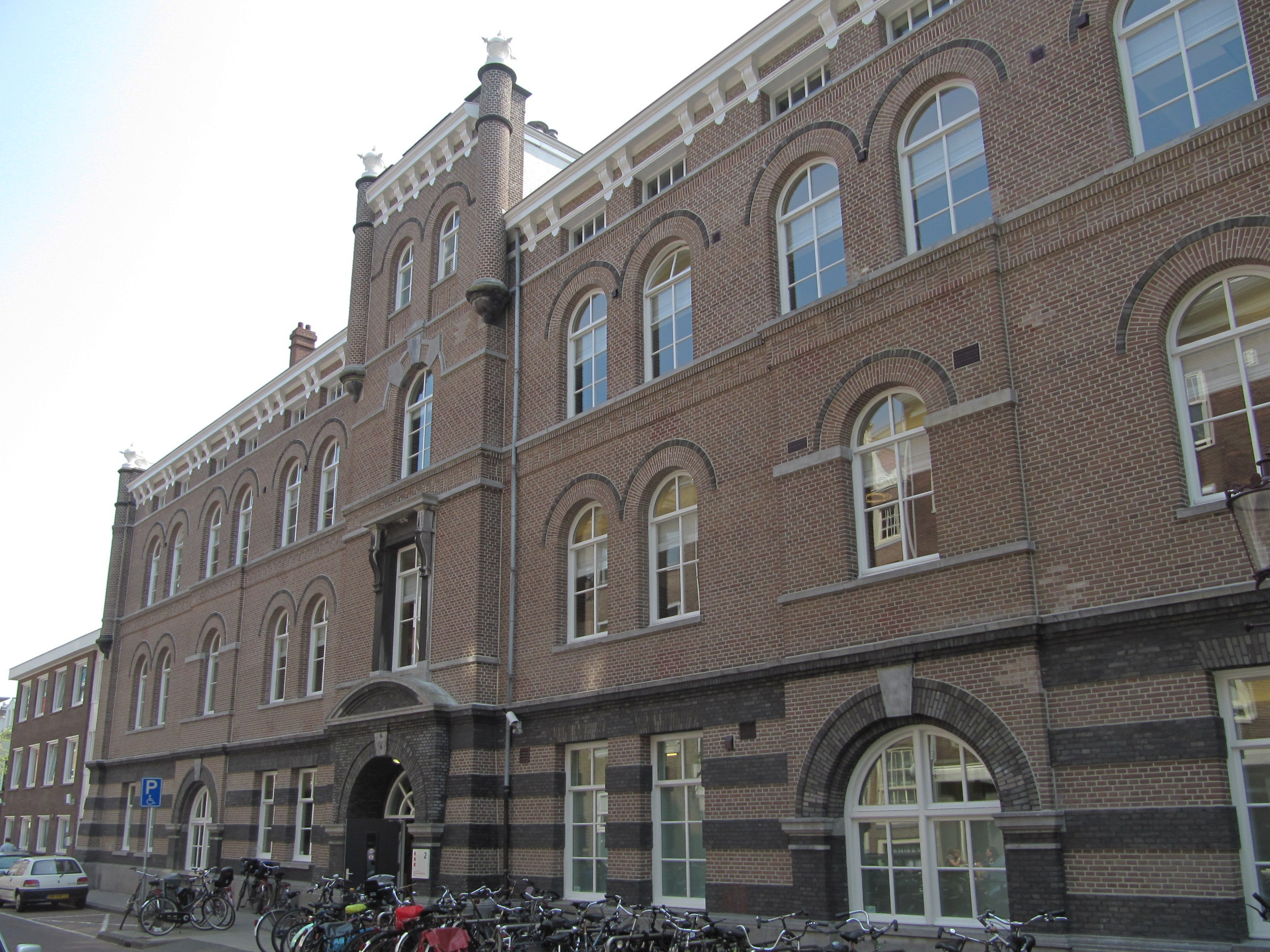 Amsterdam - Valckenierstraat 2. Voormalige brandweerkazerne (1873, door stadsarchitect B. de Greef) in een op Italiaanse middeleeuwse en vroege renaissance-architectuur geinspireerde eclectische trant. Eerste kantoor van de Bouw- en Woningdienst van de gemeente Amsterdam, en van de Gemeentelijke Woningdienst Amsterdam die in 1915 werd opgericht.